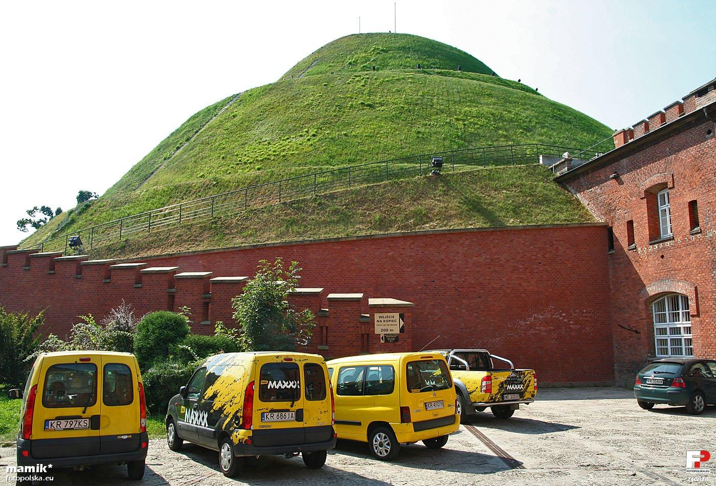 W fortach wokół kopca ma siedzibę RMF